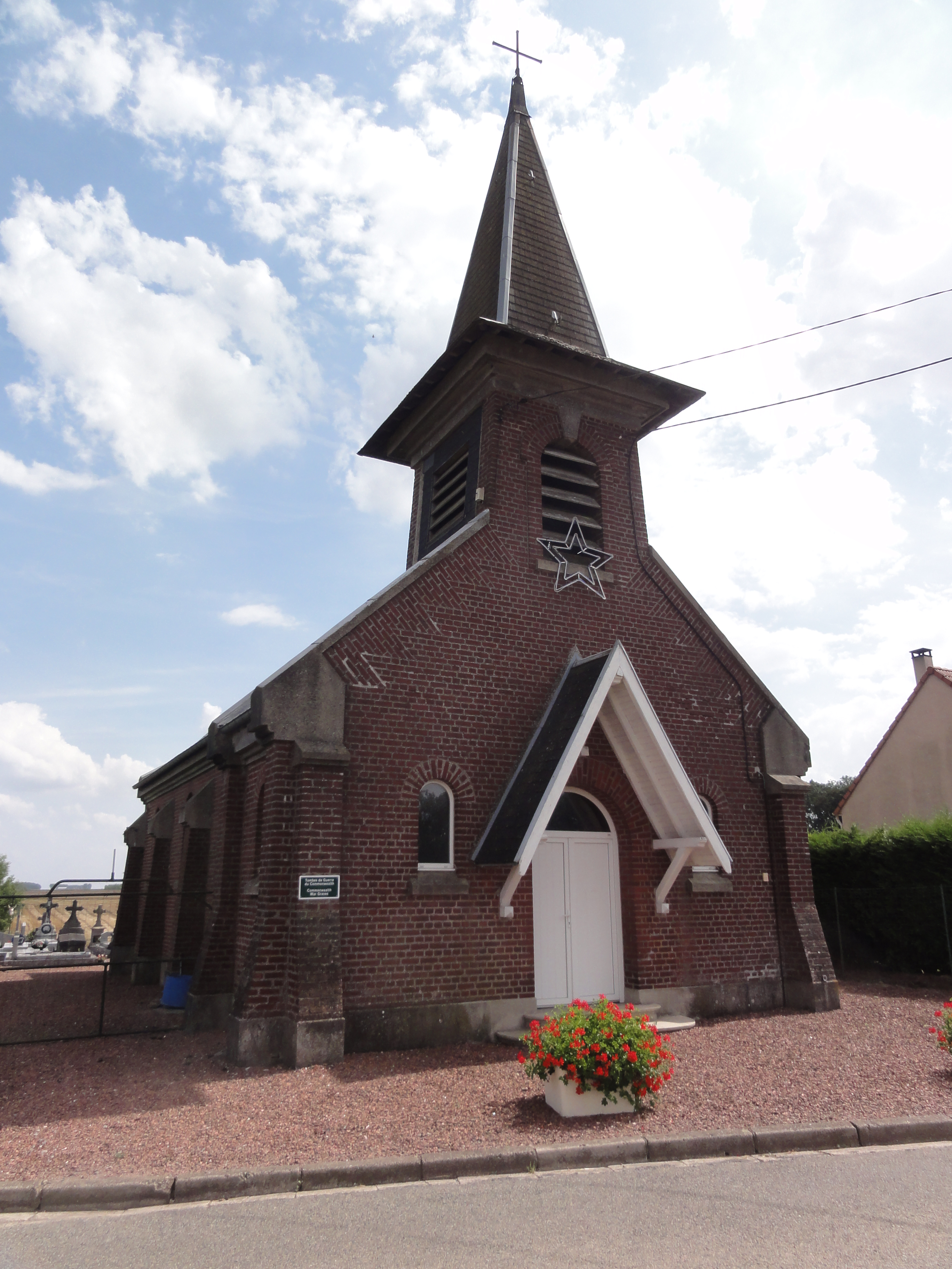 Lempire (Aisne) église